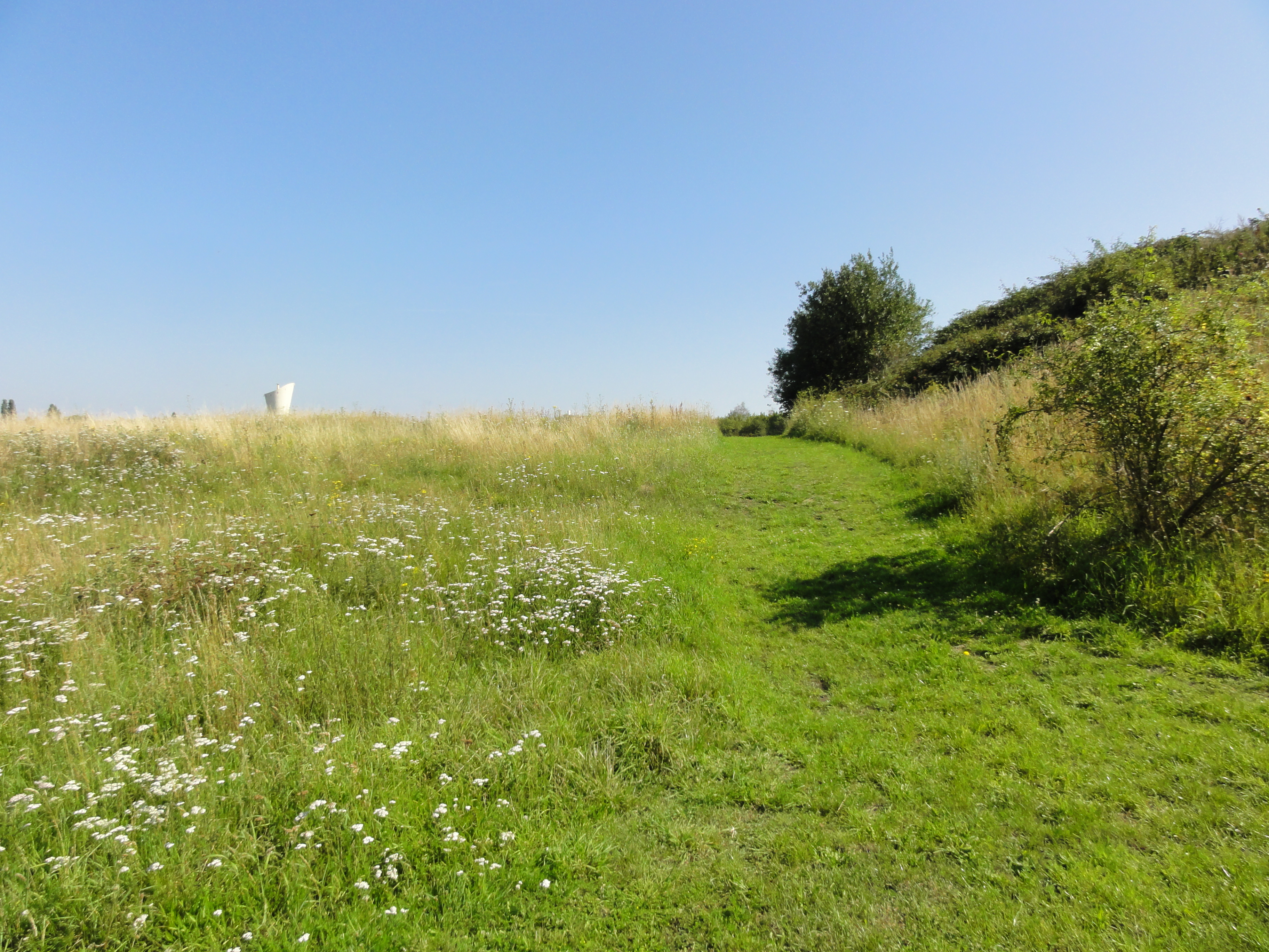 Terril n° 60 dit 2 de Nœux, fosse n° 2 - 2 bis de la Compagnie des mines de Nœux dans le bassin minier du Nord-Pas-de-Calais, Hersin-Coupigny, Pas-de-Calais, Nord-Pas-de-Calais, France.